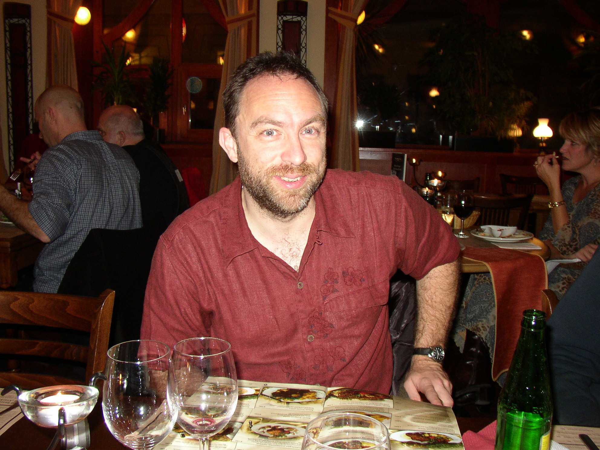 Wikipedia Hungary meets Jimbo, 2005/10/14